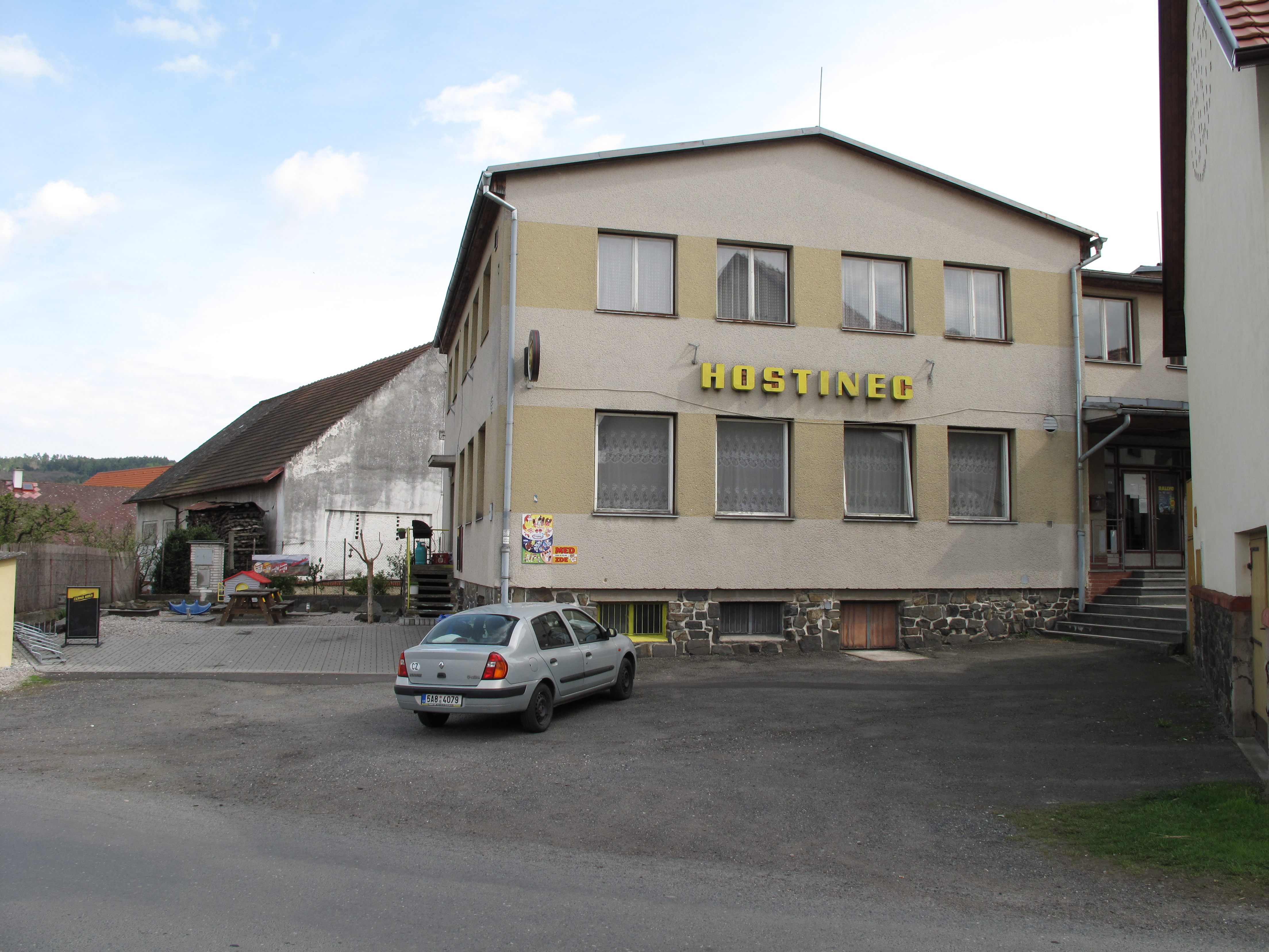 Svrčovec. Okres Klatovy, Česká republika.